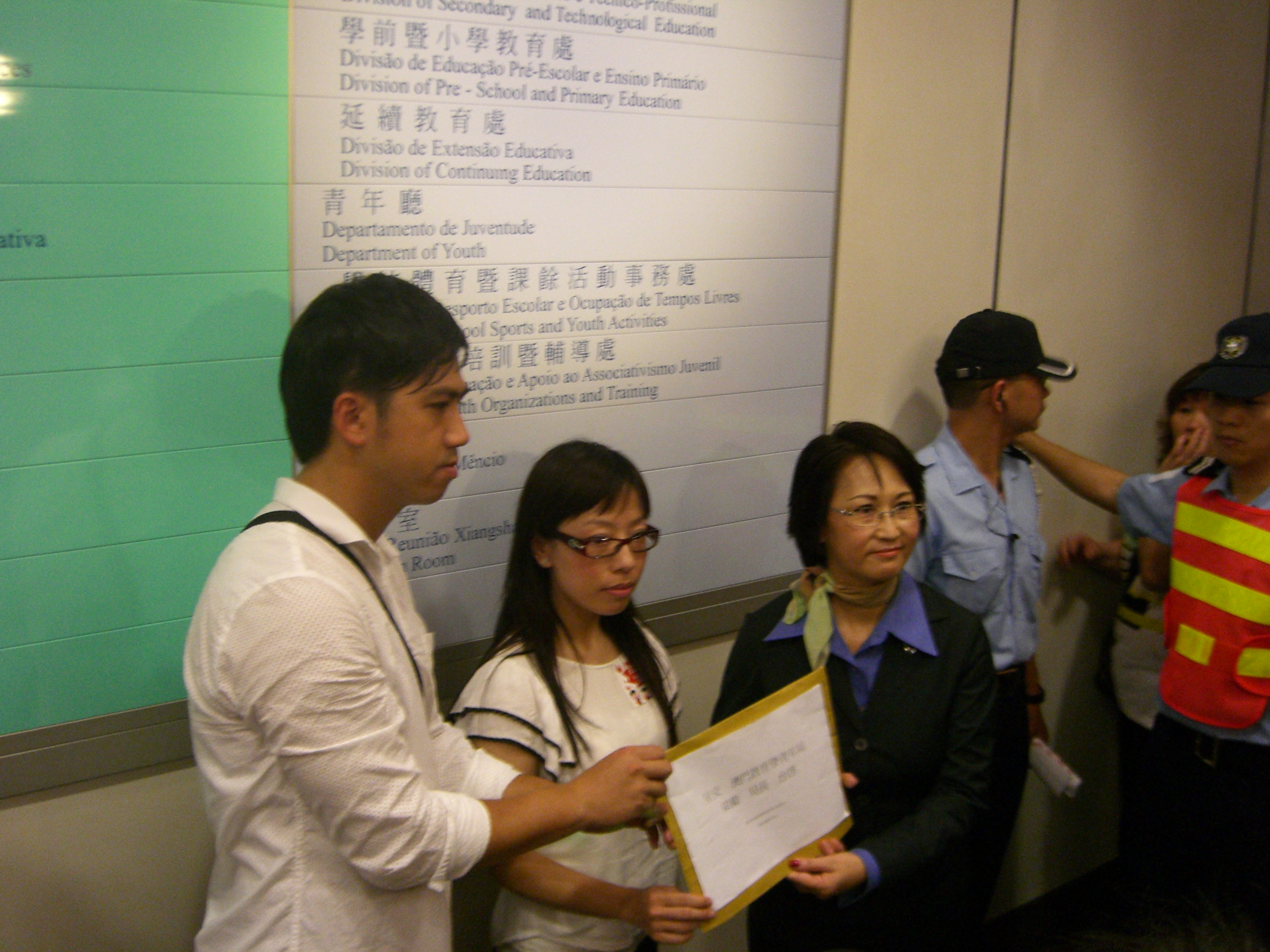 2011年澳門勞動節遊行